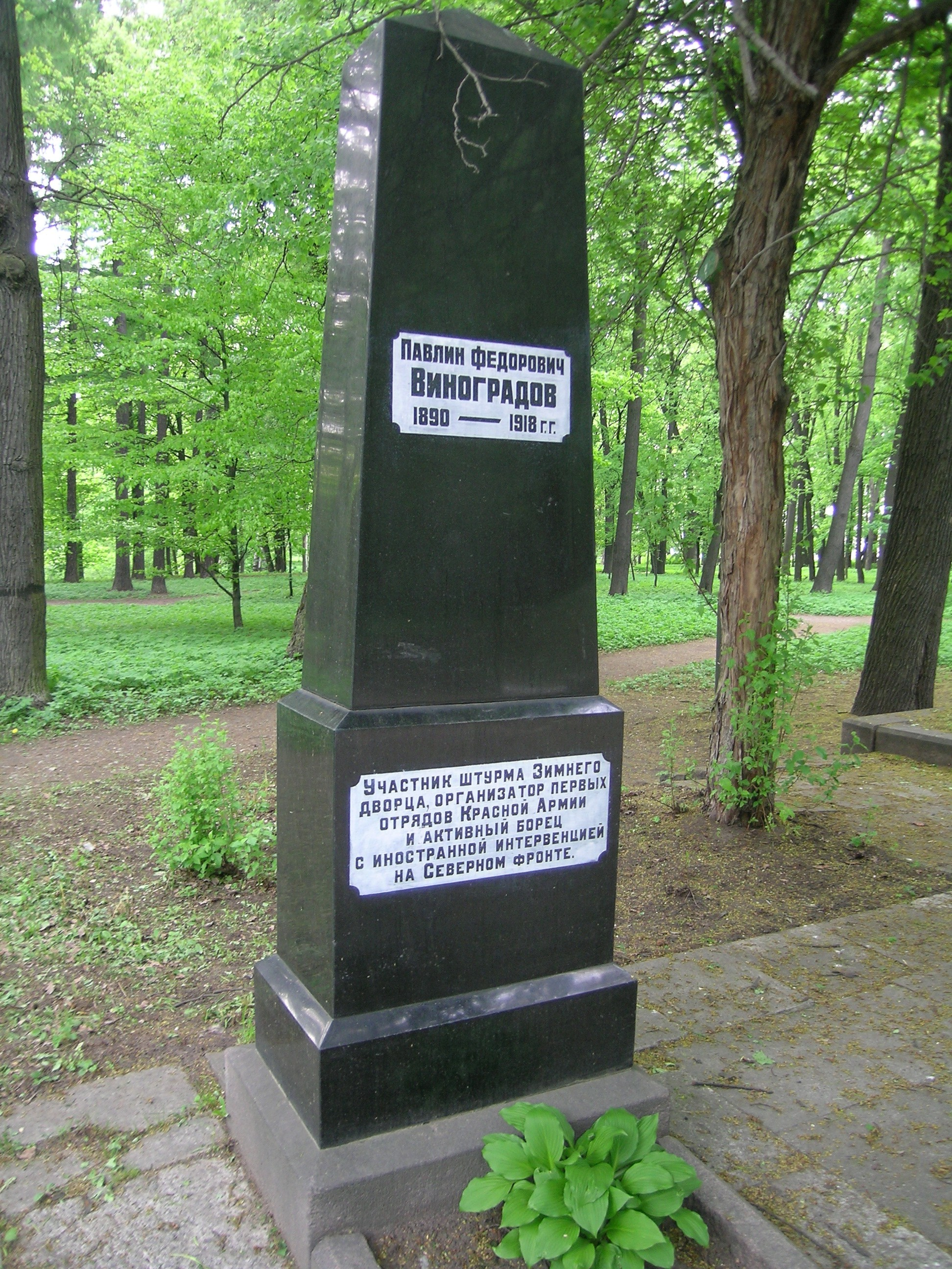 Павлин Фёдорович Виноградов 1890—1918 г.г. Участник штурма Зимнего дворца, организатор первых отрядов Красной Армии и активный борец с иностранной интервенцией на Северном фронте.